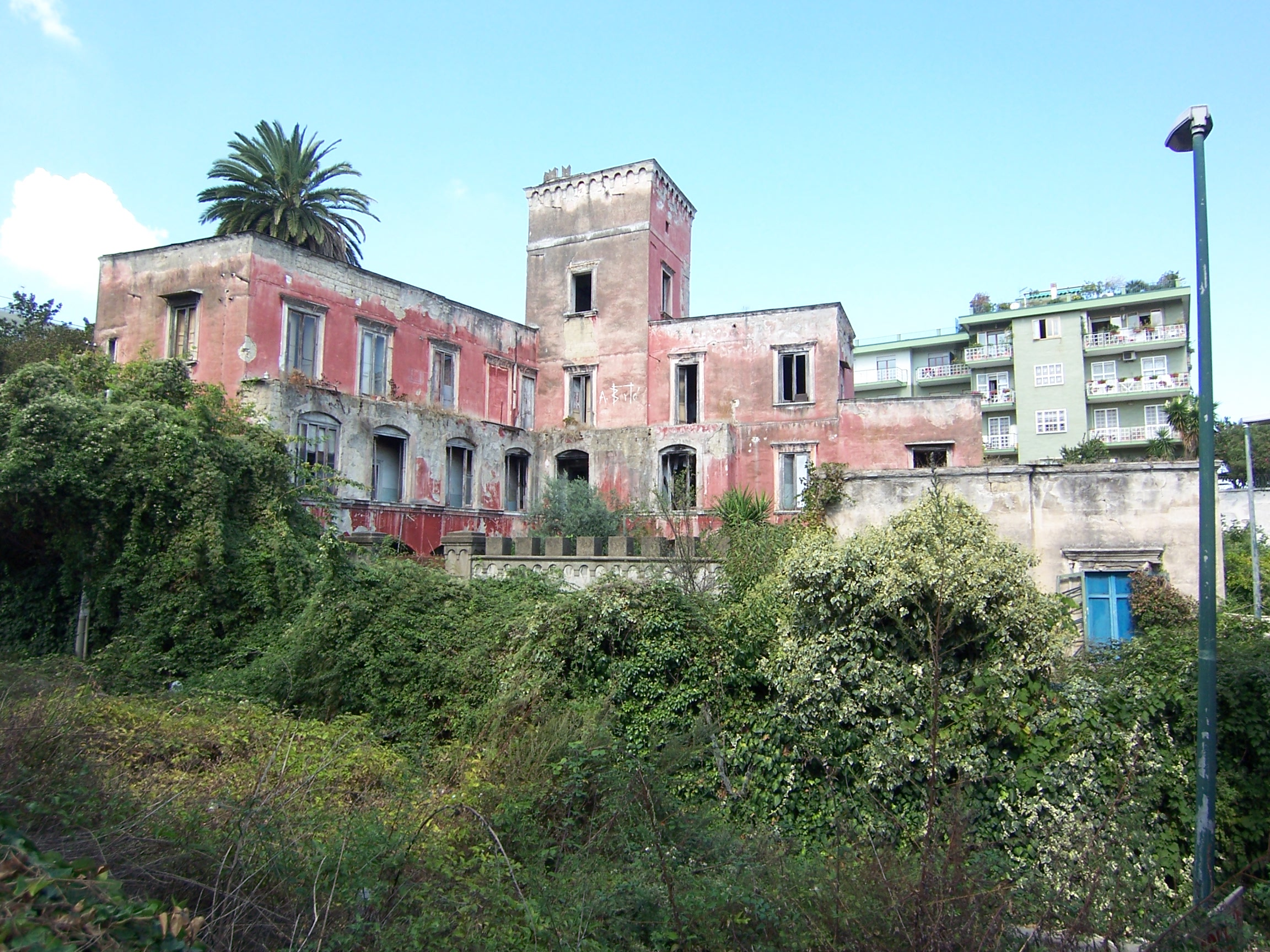 Torre Caselli, villa di campagna dei marchesi Caselli ai Colli Aminei adesso in rovina. Vi abitò il pittore Antonio Berté che vi tenne lo studio fino all'inizio degli anni 90. La firma A Berté è ancora visibile sul muro sotto la torre centrale. L'ultimo abitante nel rudere di villa Caselli ai Colli Aminei è stata la famiglia Merlin.